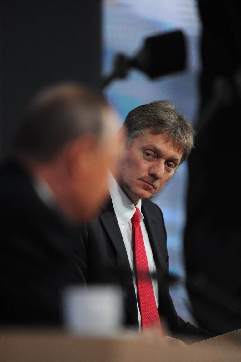 Заместитель Руководителя Администрации Президента – пресс-секретарь Президента Дмитрий Песков во время большой пресс-конференции Владимира Путина